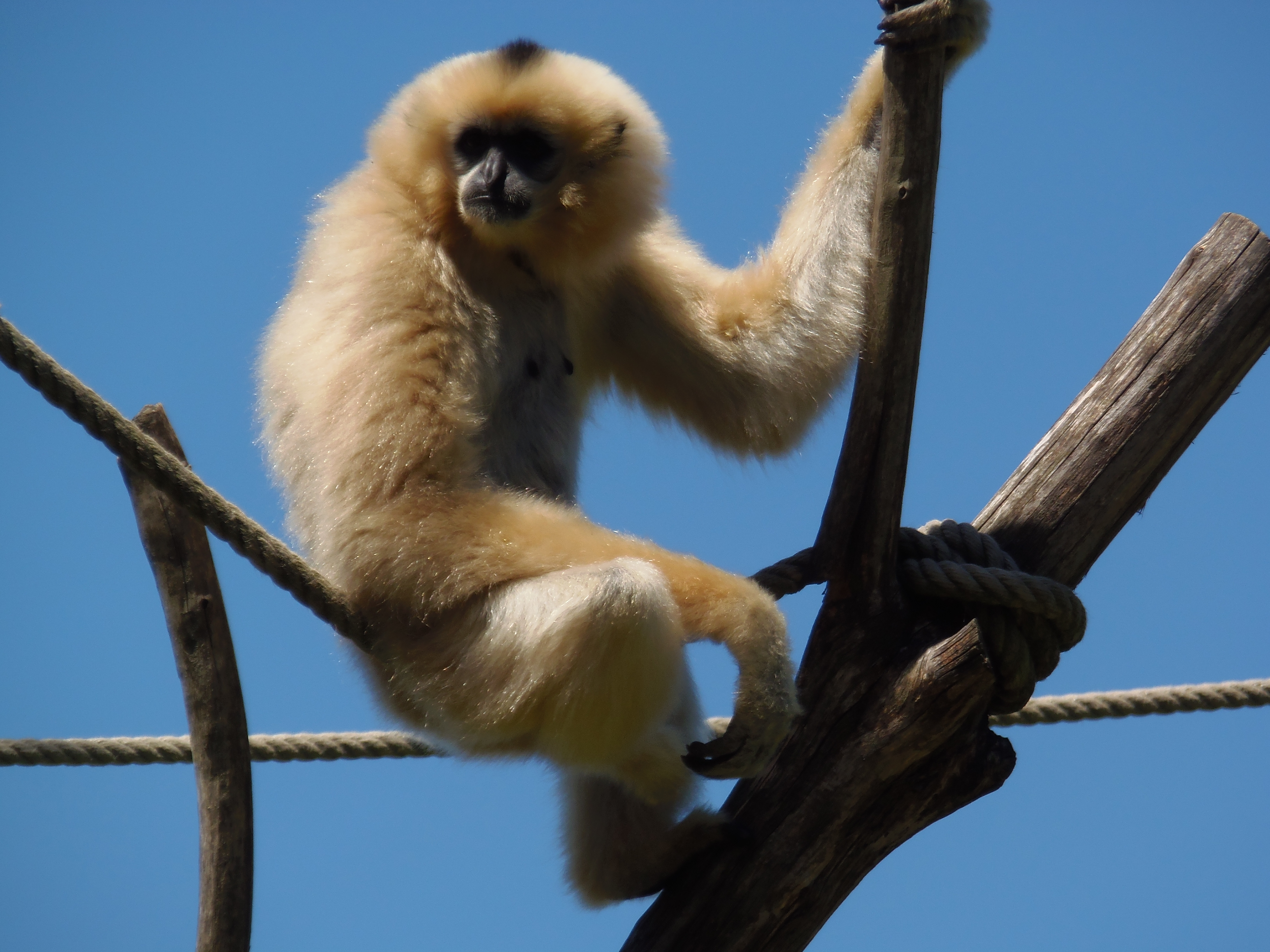 Champrepus (Normandie, France). Gibbon à favoris roux (Nomascus gabriella) du zoo.